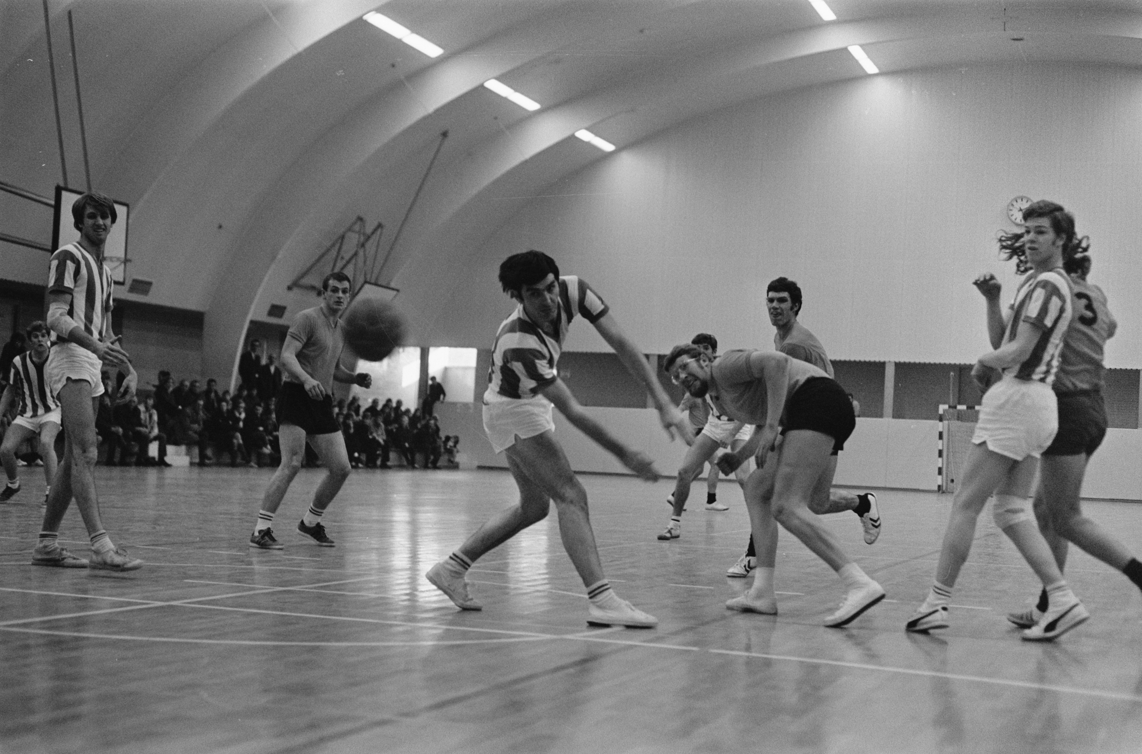 Collectie / Archief : Fotocollectie Anefo Reportage / Serie : [ onbekend ] Beschrijving : Handbal Niloc tegen V en L . Meuffels (V) midden kijkt naar bal van Keyzer (M) Datum : 4 januari 1970 Locatie : Niloc Trefwoorden : HANDBAL Persoonsnaam : KEYZER Fotograaf : Verhoeff, Bert / Anefo Auteursrechthebbende : Nationaal Archief Materiaalsoort : Negatief (zwart/wit) Nummer archiefinventaris : bekijk toegang 2.24.01.05 Bestanddeelnummer : 923-1237